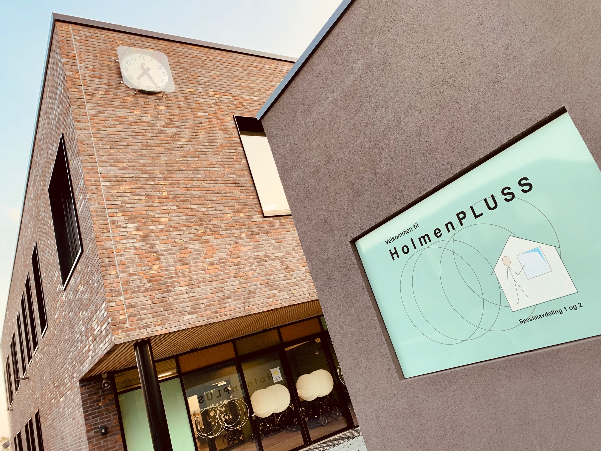 Holmen skole, Oslo, spesialavdeling